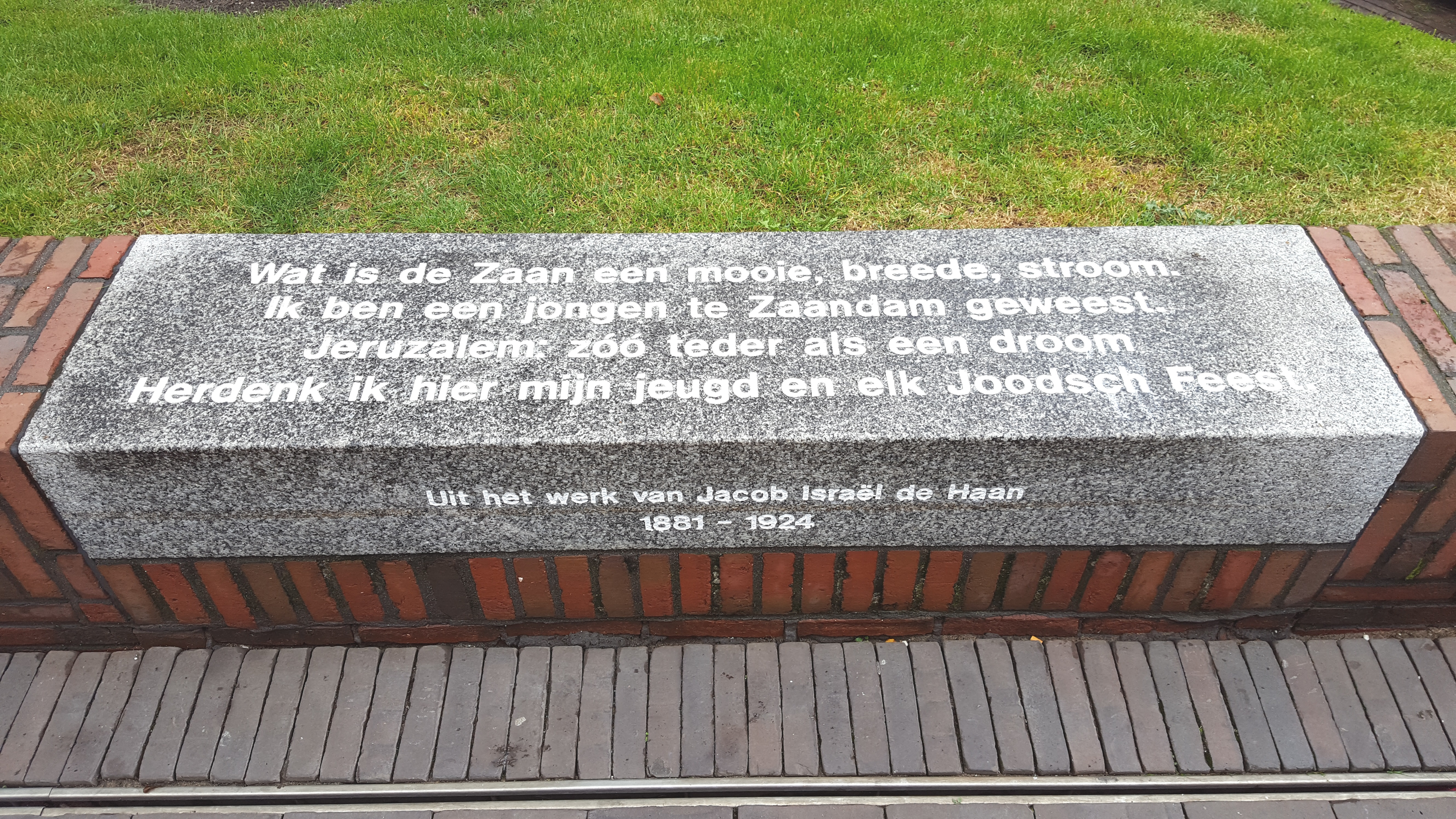 ספסל זכרון לדה האן בזאנדאם